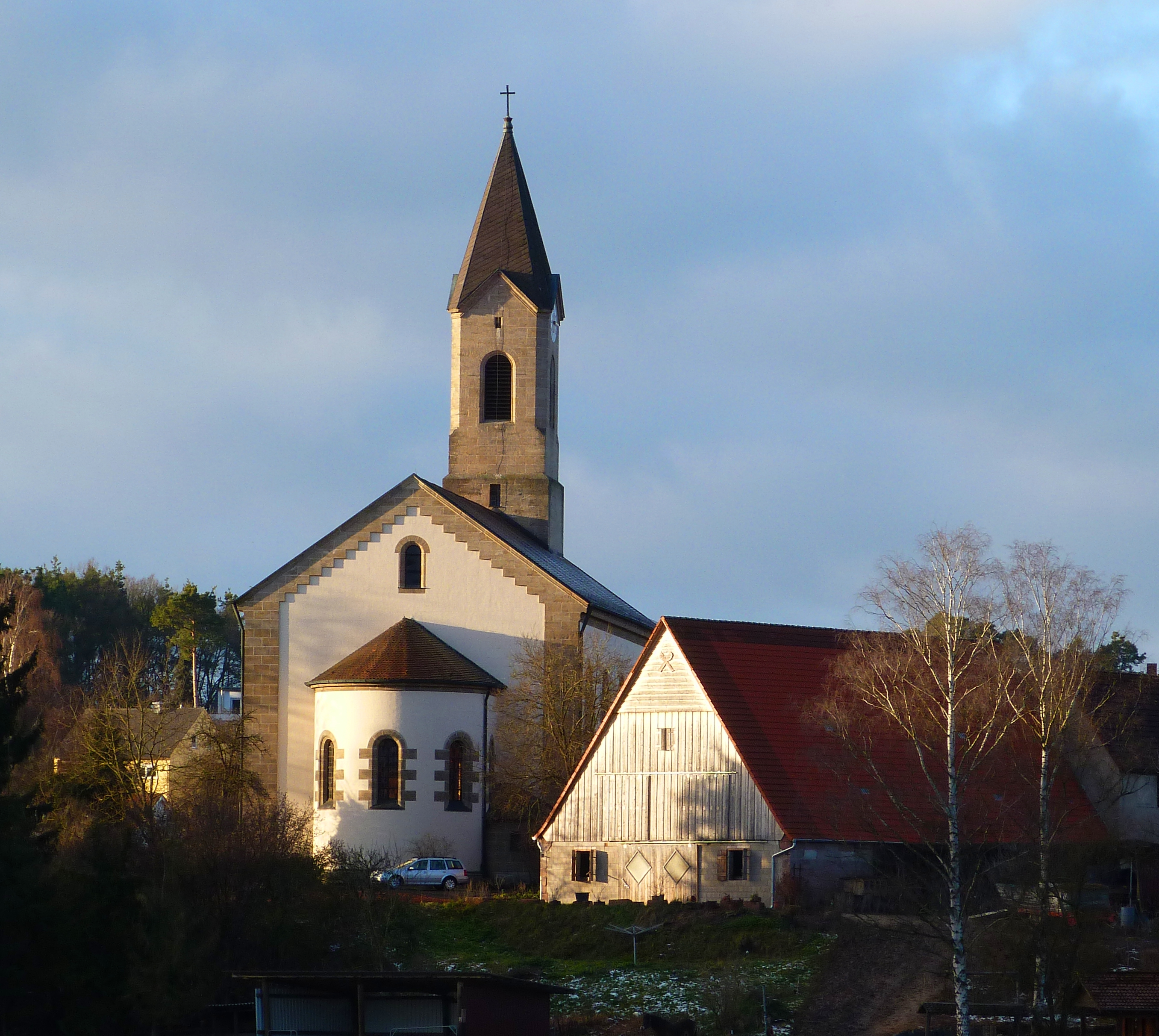 St. Andreaskirche